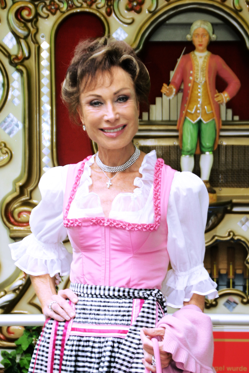 Antje-Katrin Kühnemann, Ärztin und Fernsehmoderatorin